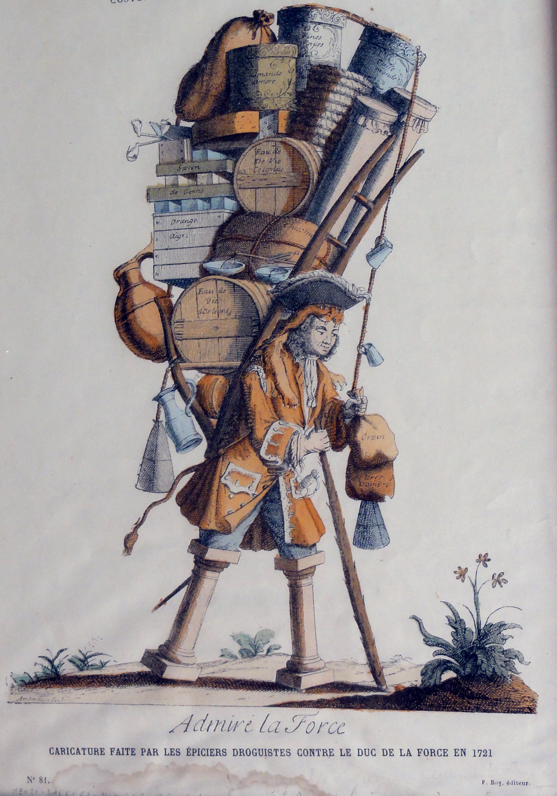 Henri-Jacques de Caumont, duc de La Force (Musée Château de Monbazillac)